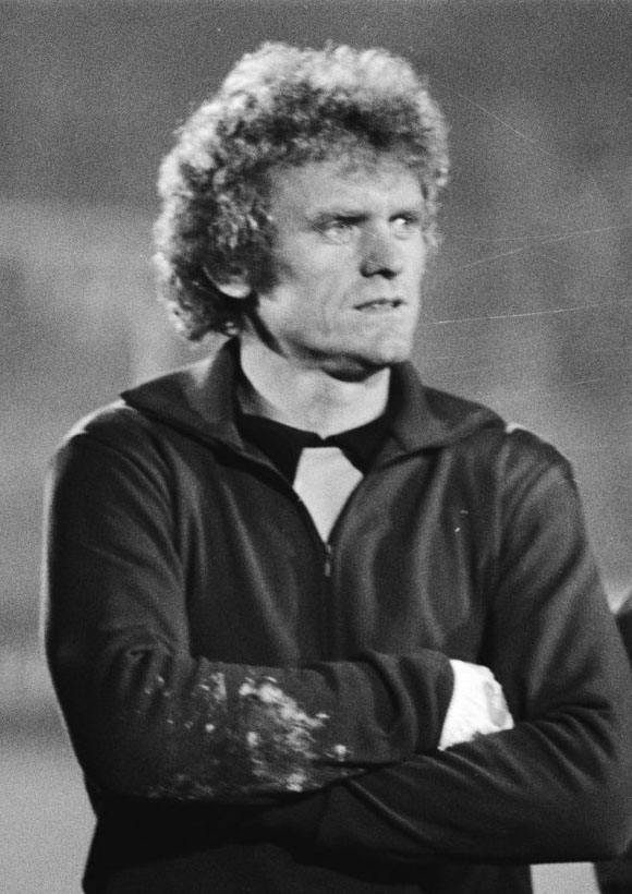 Sepp Maier bij de afscheidswedstrijd van Johan Cruijff.